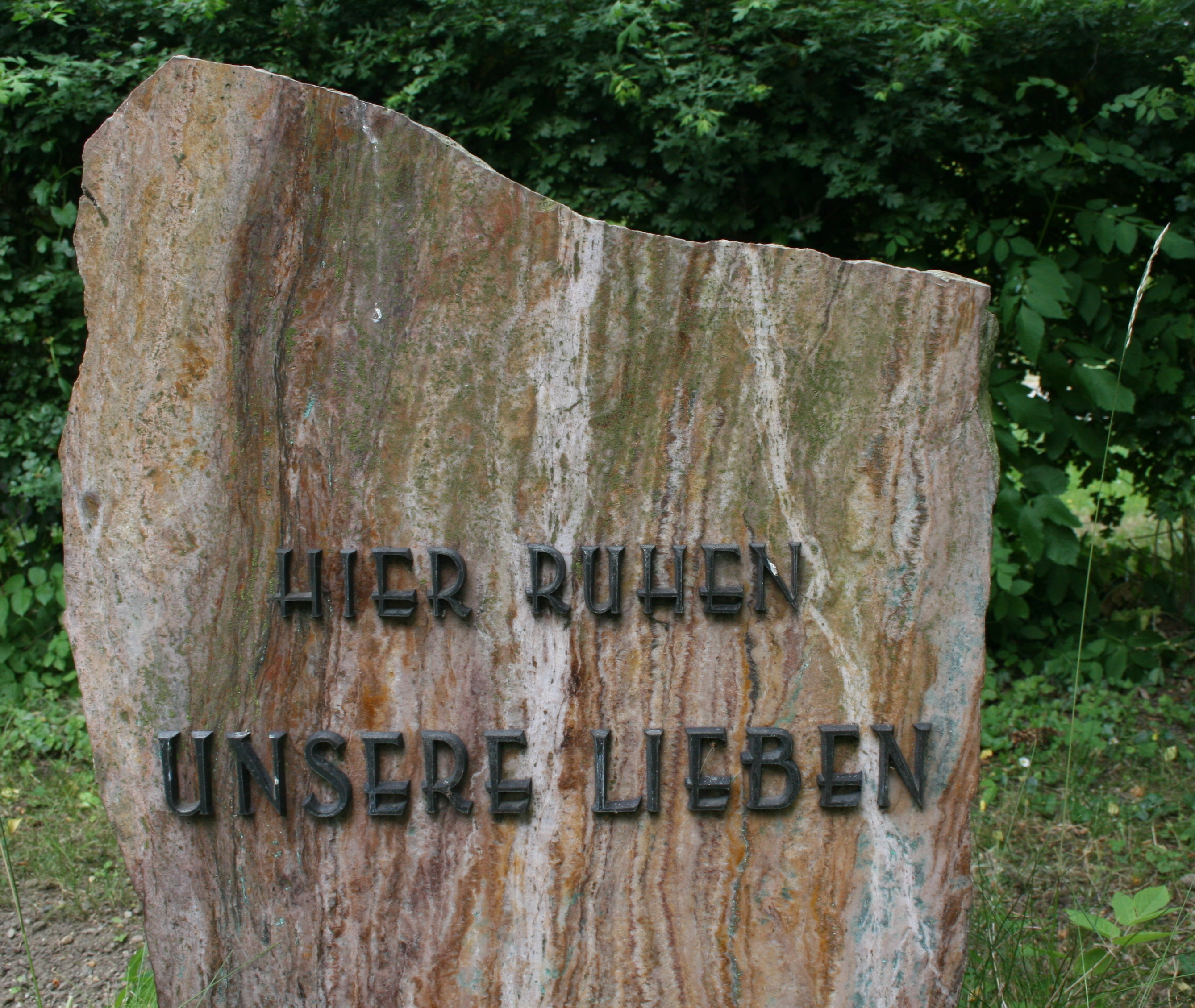 Odenwald-Quarz, Grabmal